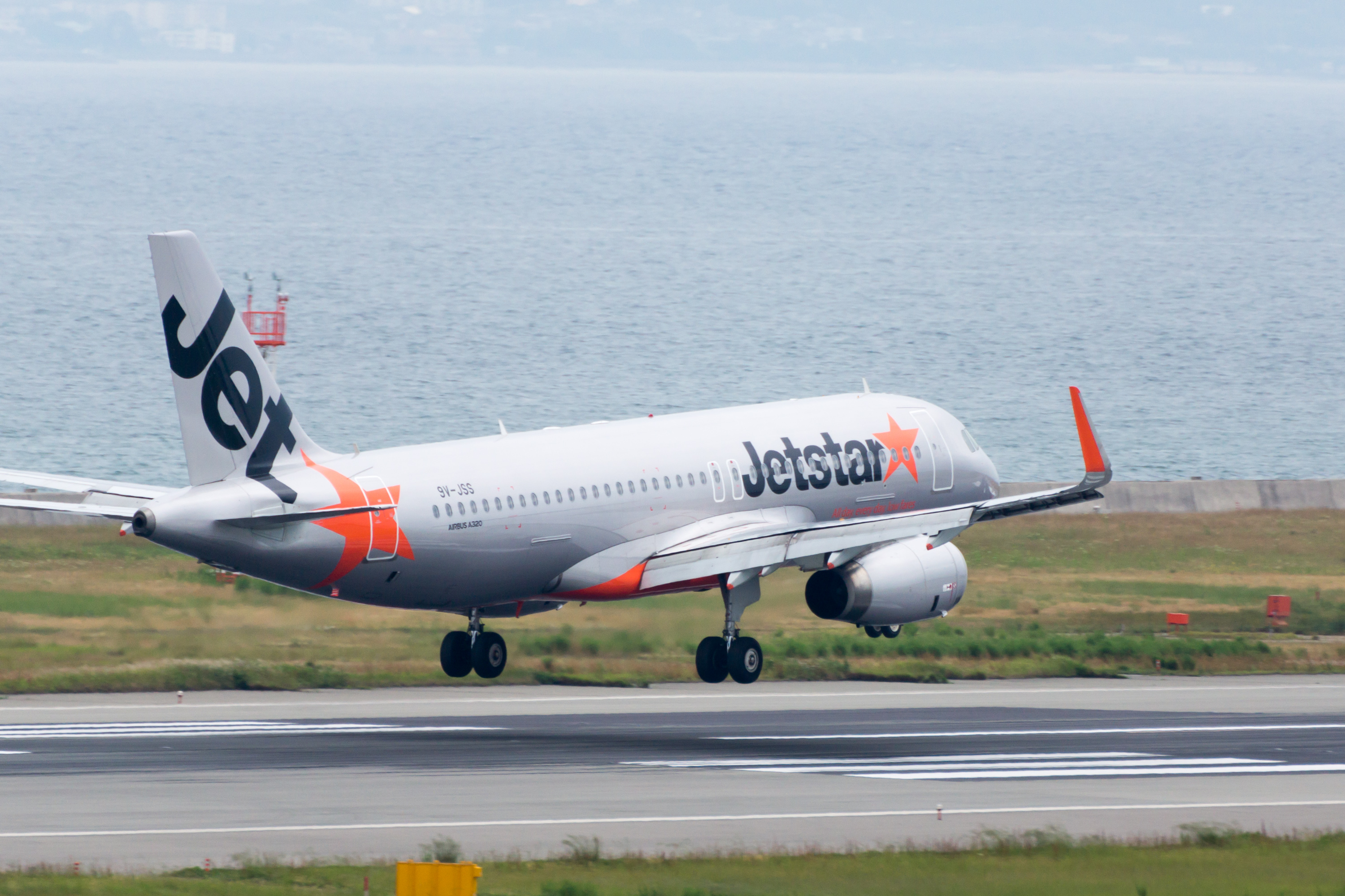 Jetstar Asia Airways / ジェットスター・アジア航空 Airbus A320-232 9V-JSS 3K721, Arrived from Singapore via Taipei Osaka Kansai Int'l Airport